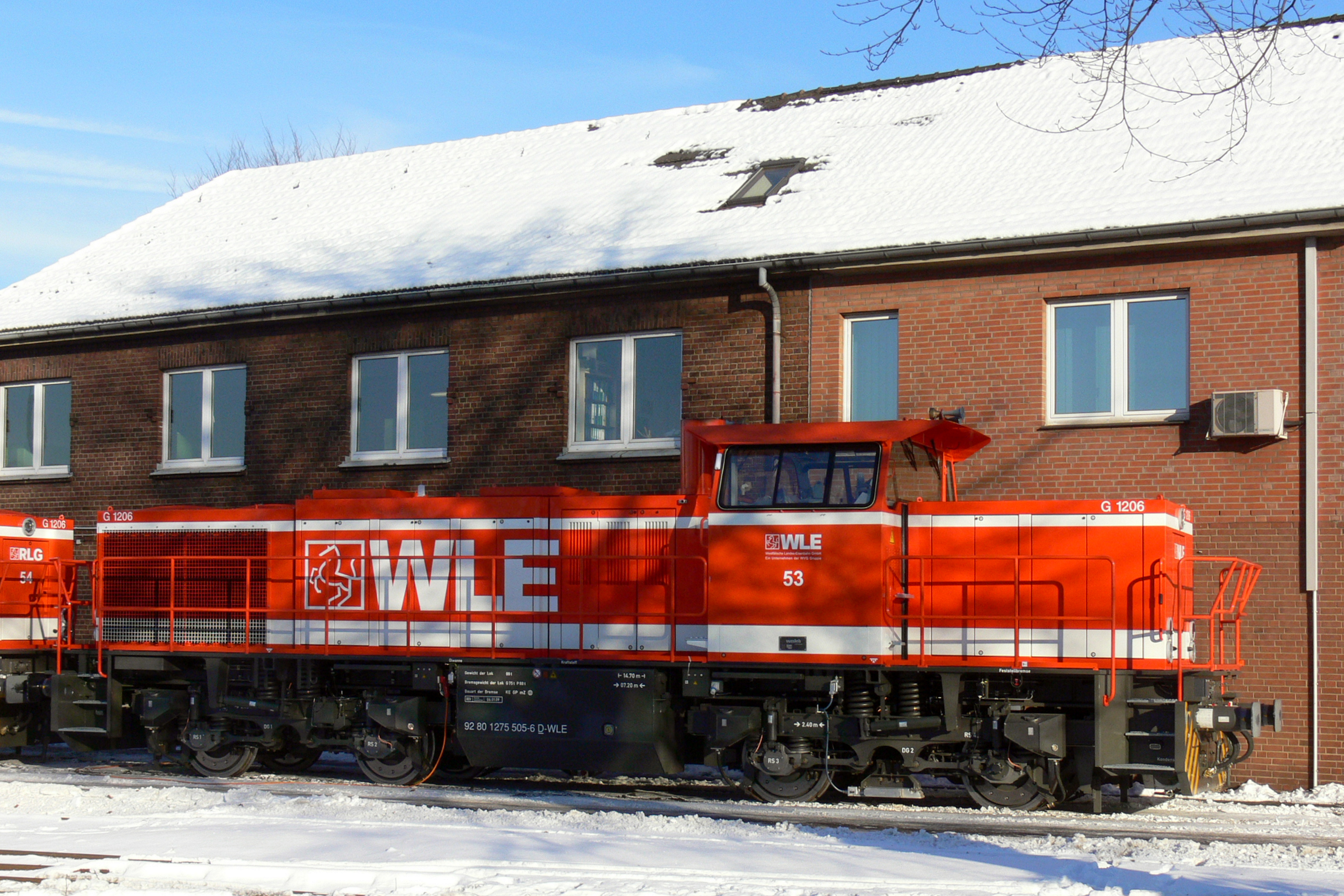 MaK G 1206 als Lok 53 der Westfälischen Landes-Eisenbahn (WLE) in Moers